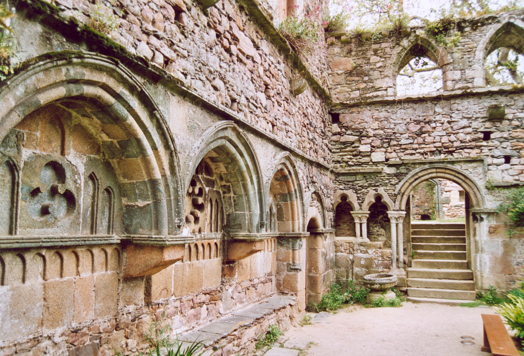 Bretagne Kérity Abbaye de Beauport Lavabos du cloître. Auteur : GIRAUD Patrick